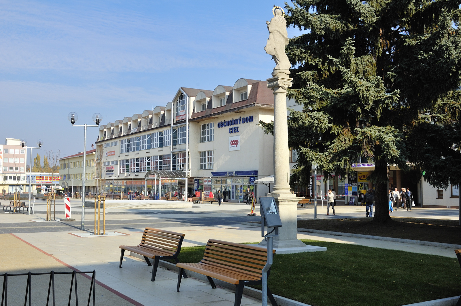 Námestie oslobodenia v Senici